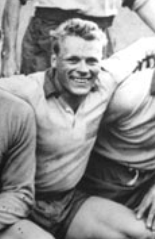 Sven Axbom en 1958